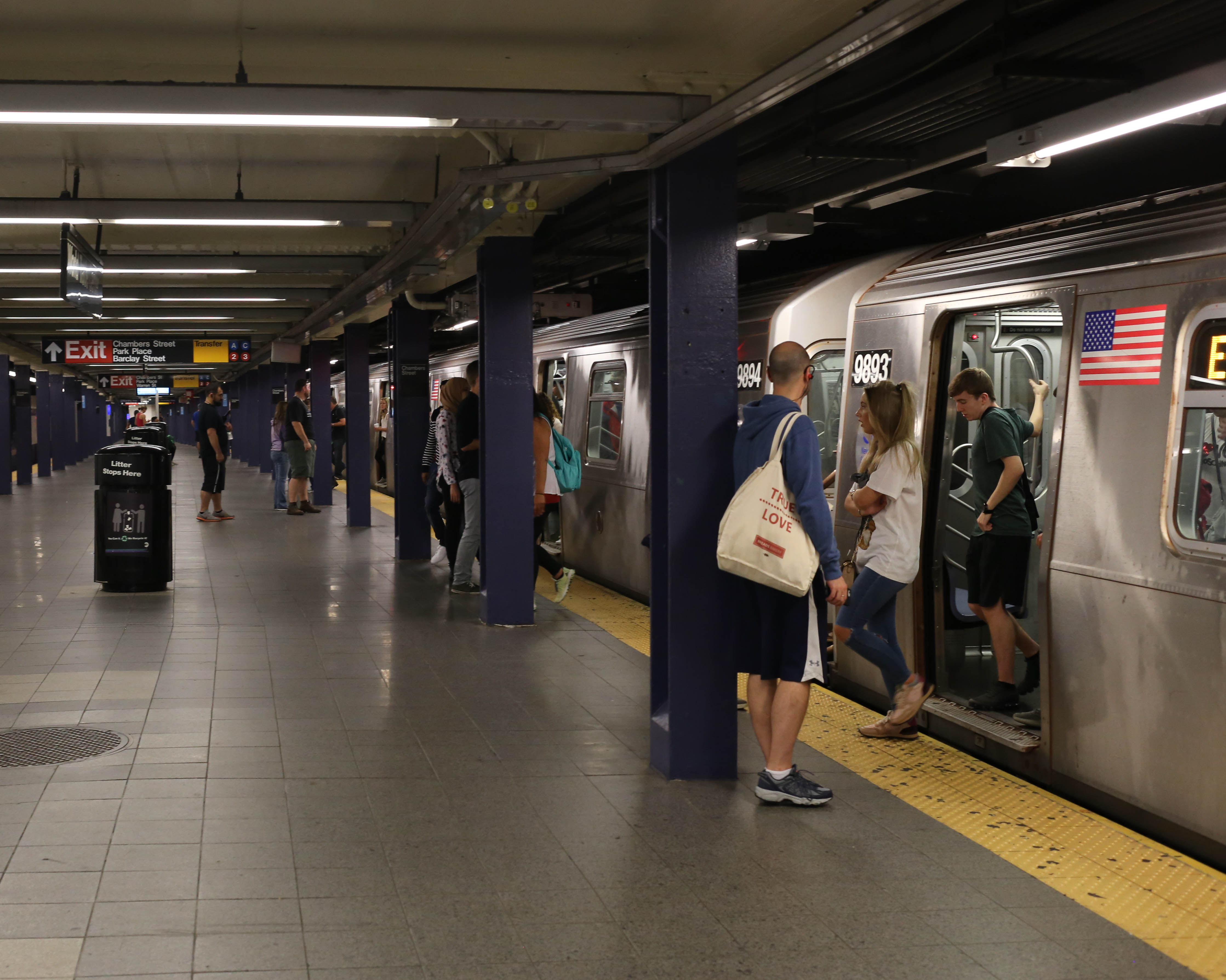 Subway